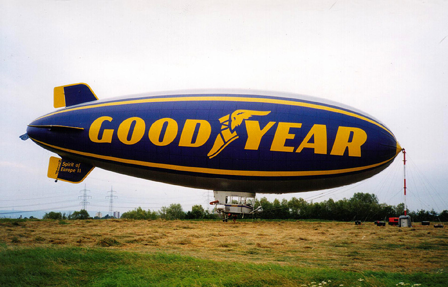 Die von der Lightship Group als Werbe-Luftschiff für Goodyear betriebene Spirit of Europe 2 (siehe: Goodyear-Luftschiffe) im Jahr 1998.